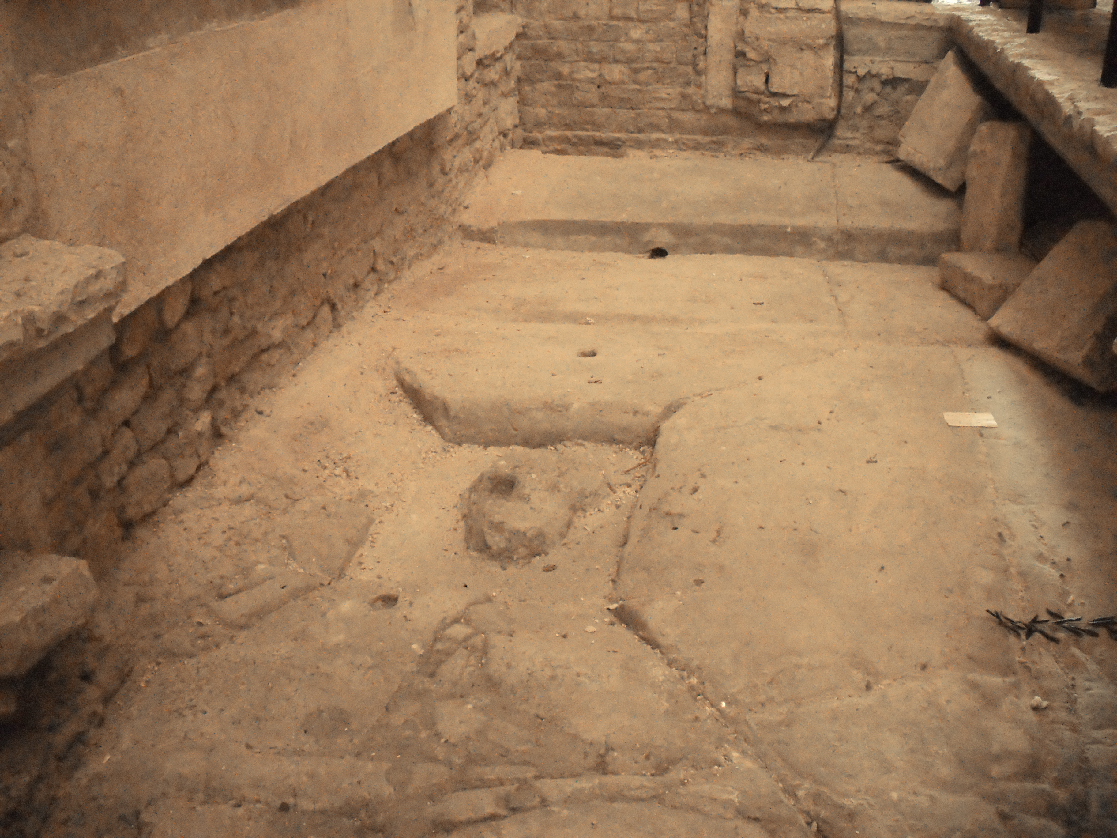 Cardo retrouvé sous le sol de la cathédrale Saint-Sauveur d'Aix-en-Provence, Bouches-du-Rhône (France).